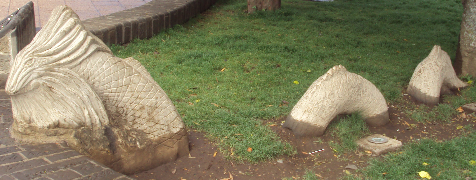 Estatua de Cai Cai Vilú en la Plaza de Ancud